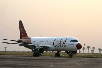 Le premier AIRBUS A320 exploité en RDC